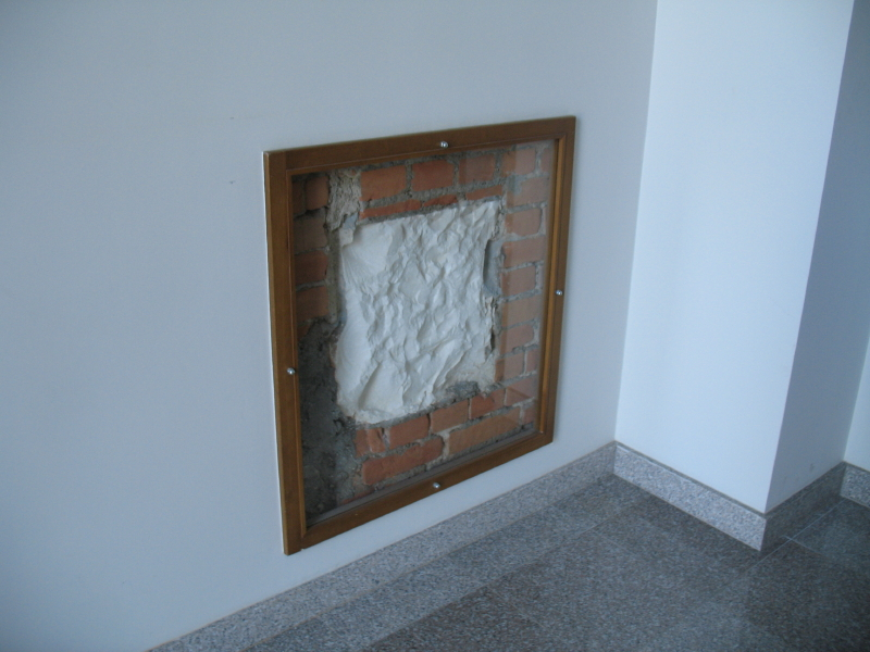 Prisikėlimo bažnyčia. Akmuo iš Jeruzalės Alyvų kalno. Autoriaus nuotrauka.